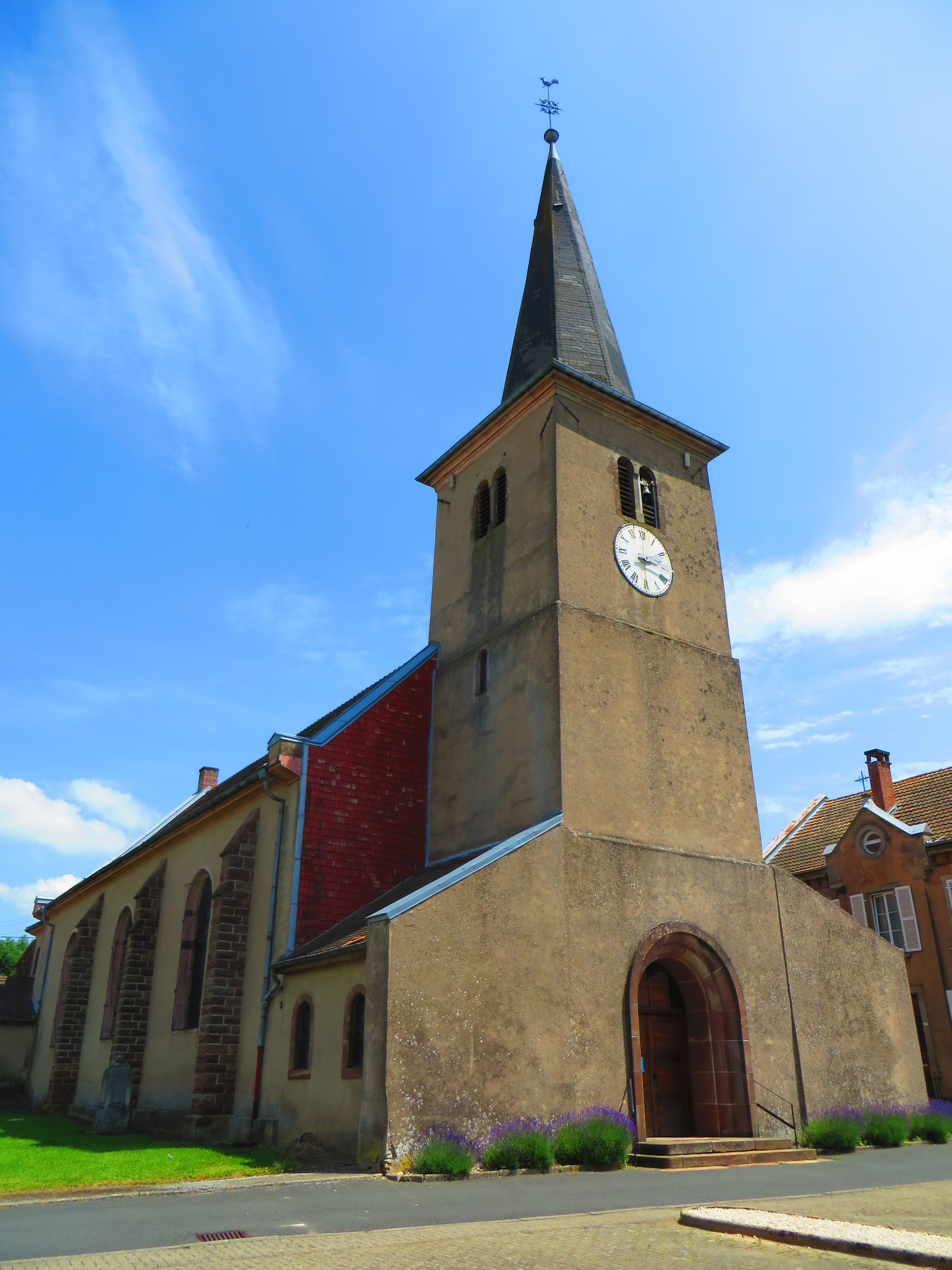 Rechicourt Chateau eglise